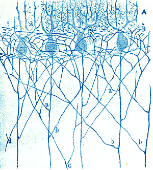 Ուղեղիկի Պուրկինյե բջջի պատկեր՝արված Կախալի կողմից